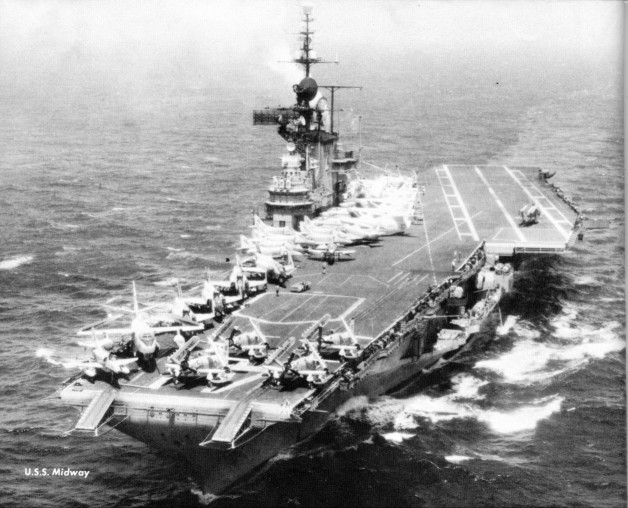 USS Midway (CVA-41) nach SCN-110